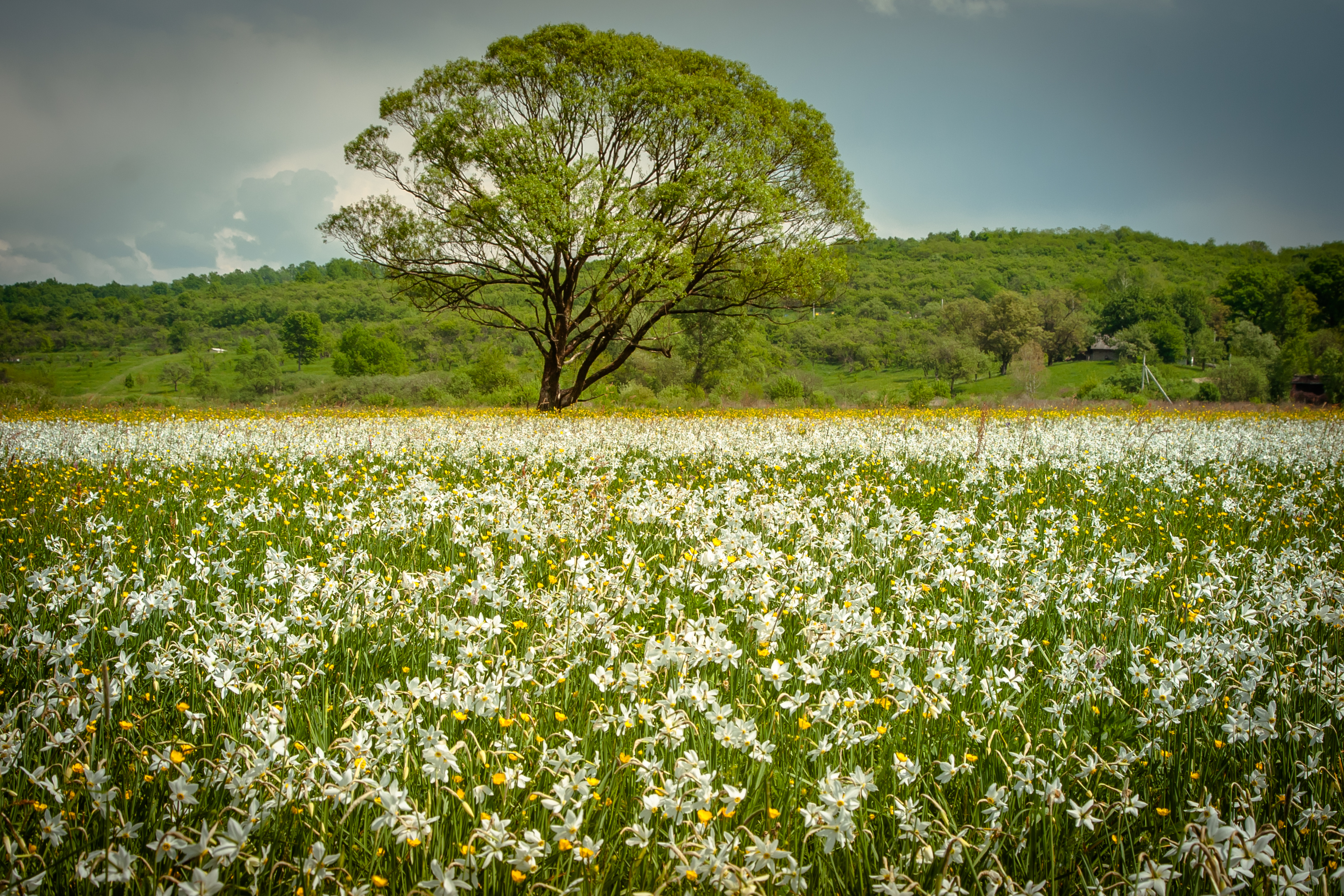 Карпатський біосферний заповідник, Рахівський, Тячівський, Хустський, Виноградівський райони